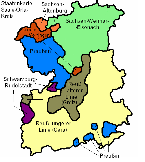 Staatenaufteilung des heutigen Saale-Orla-Kreises bis 1922